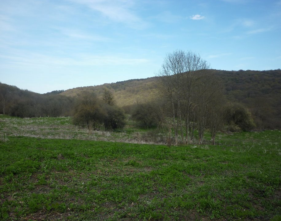 Вагацуко Адыгэбзэ: Вагъуэ цIыкIу деж